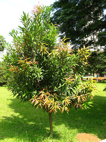 andiroba jovem em sao paulo